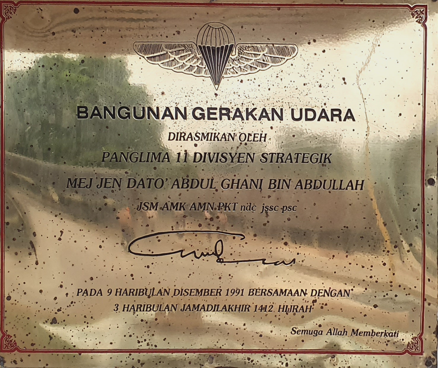 Plat perasmian bangunan Gerakan Udara